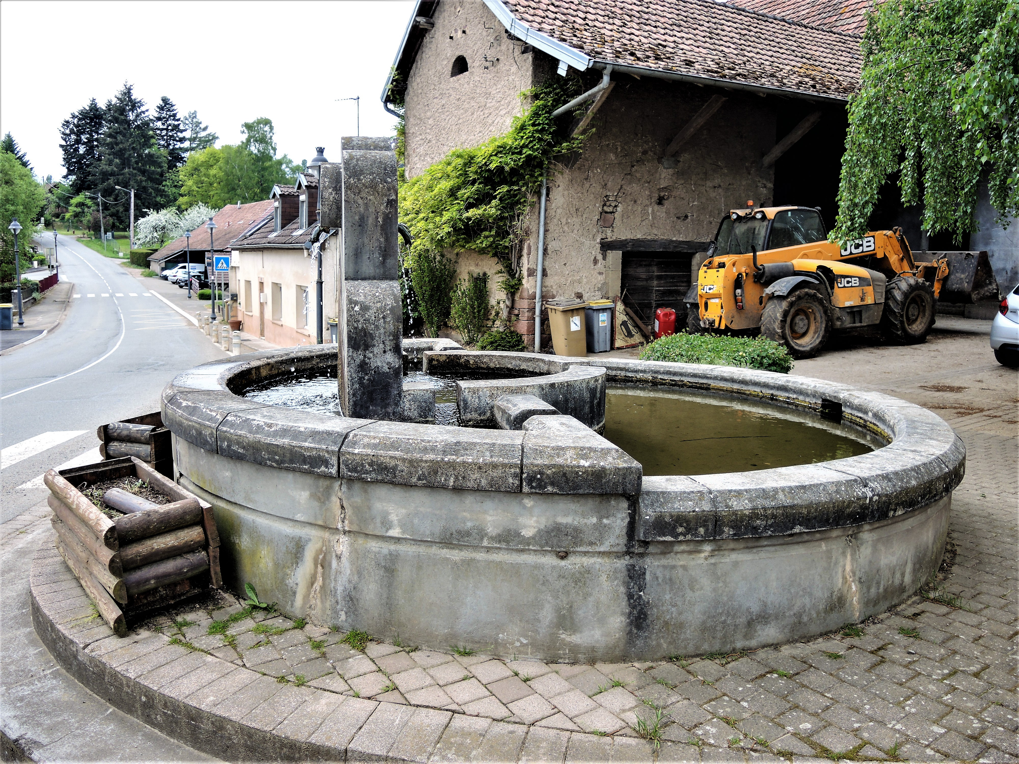 Fontaine-abreuvoir avec bassin circulaire. Vétrigne. Territoire de Belfort